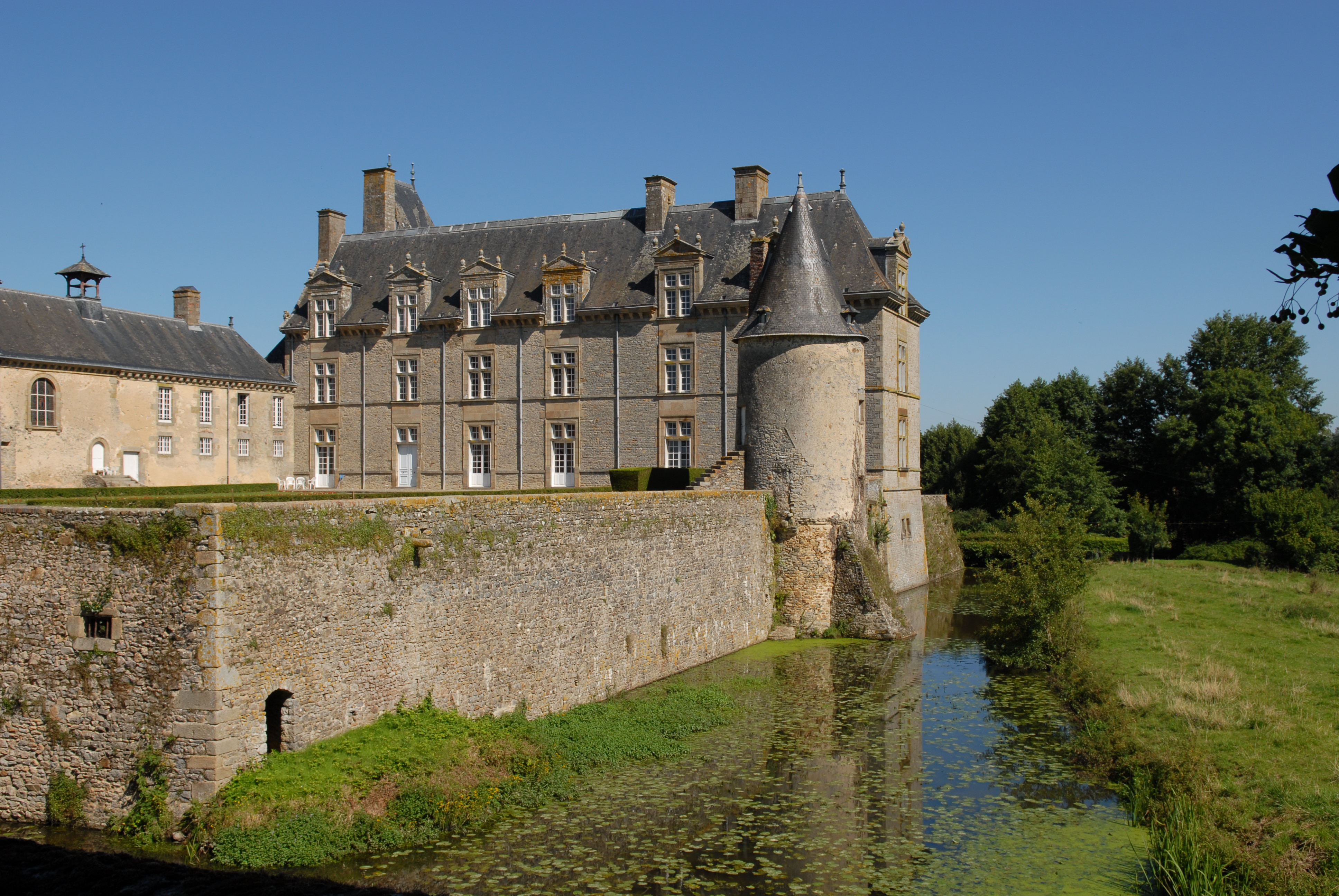 Une photographie du château de Montecler